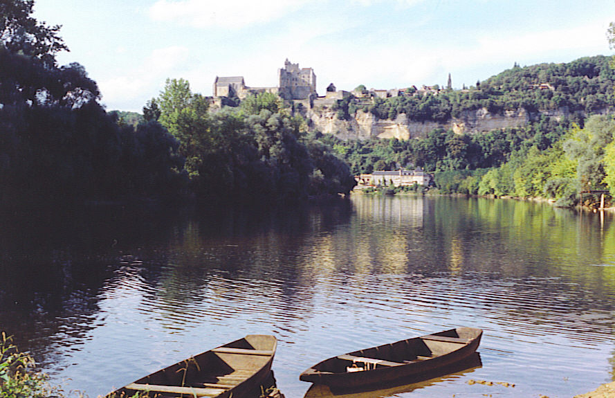 self made